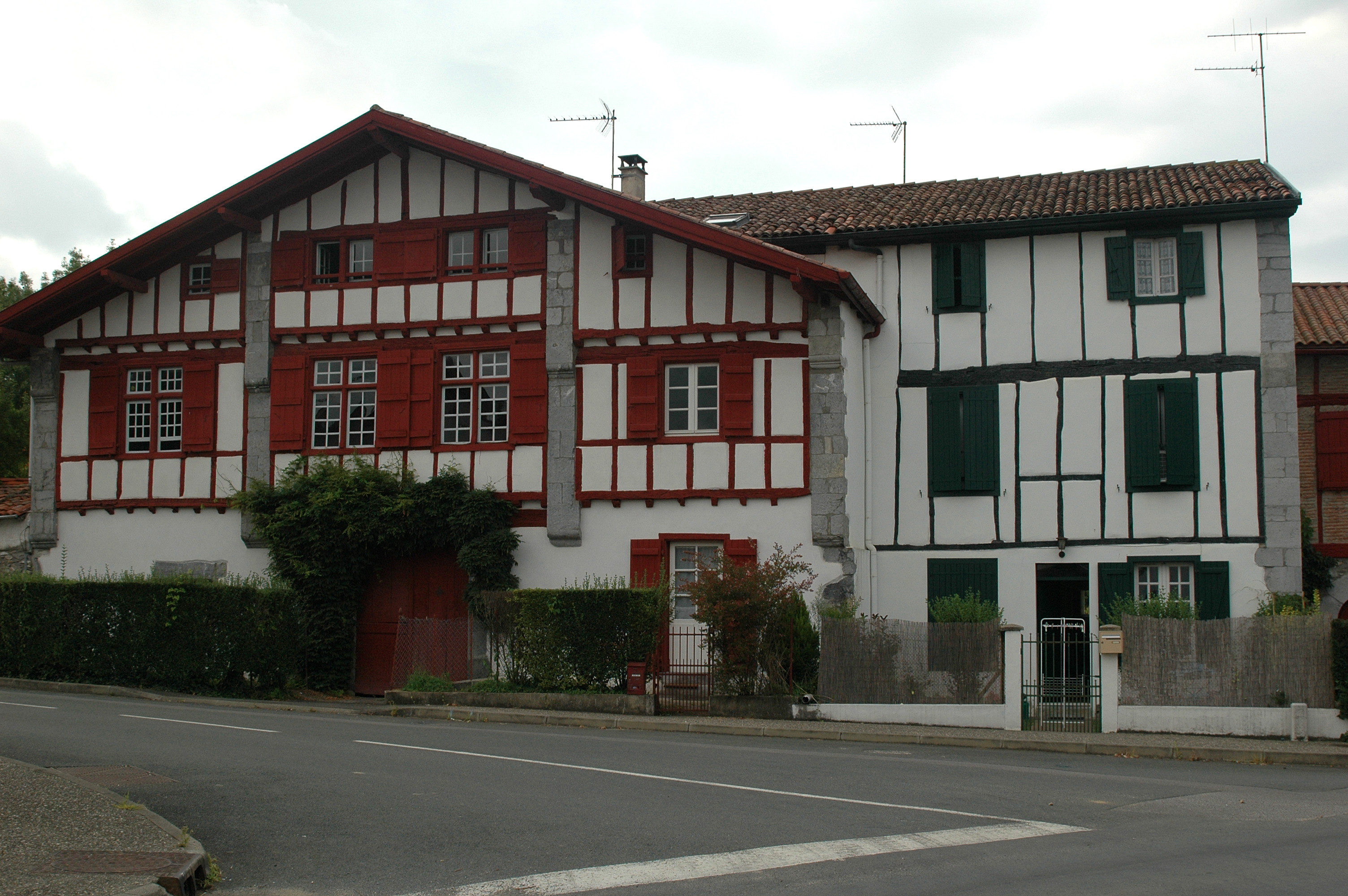 Larressore, maisons basques. Photo prise le 08/08/06 par Harrieta171